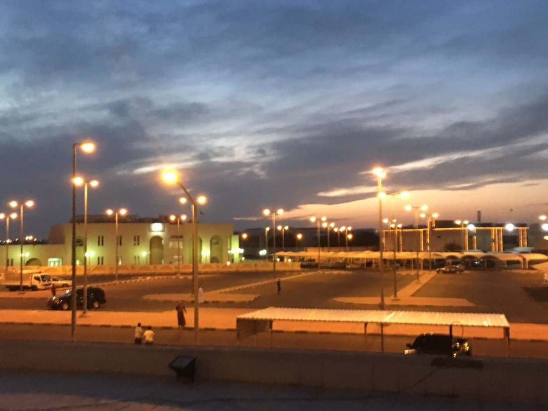 منطقة النهضة ليلاً